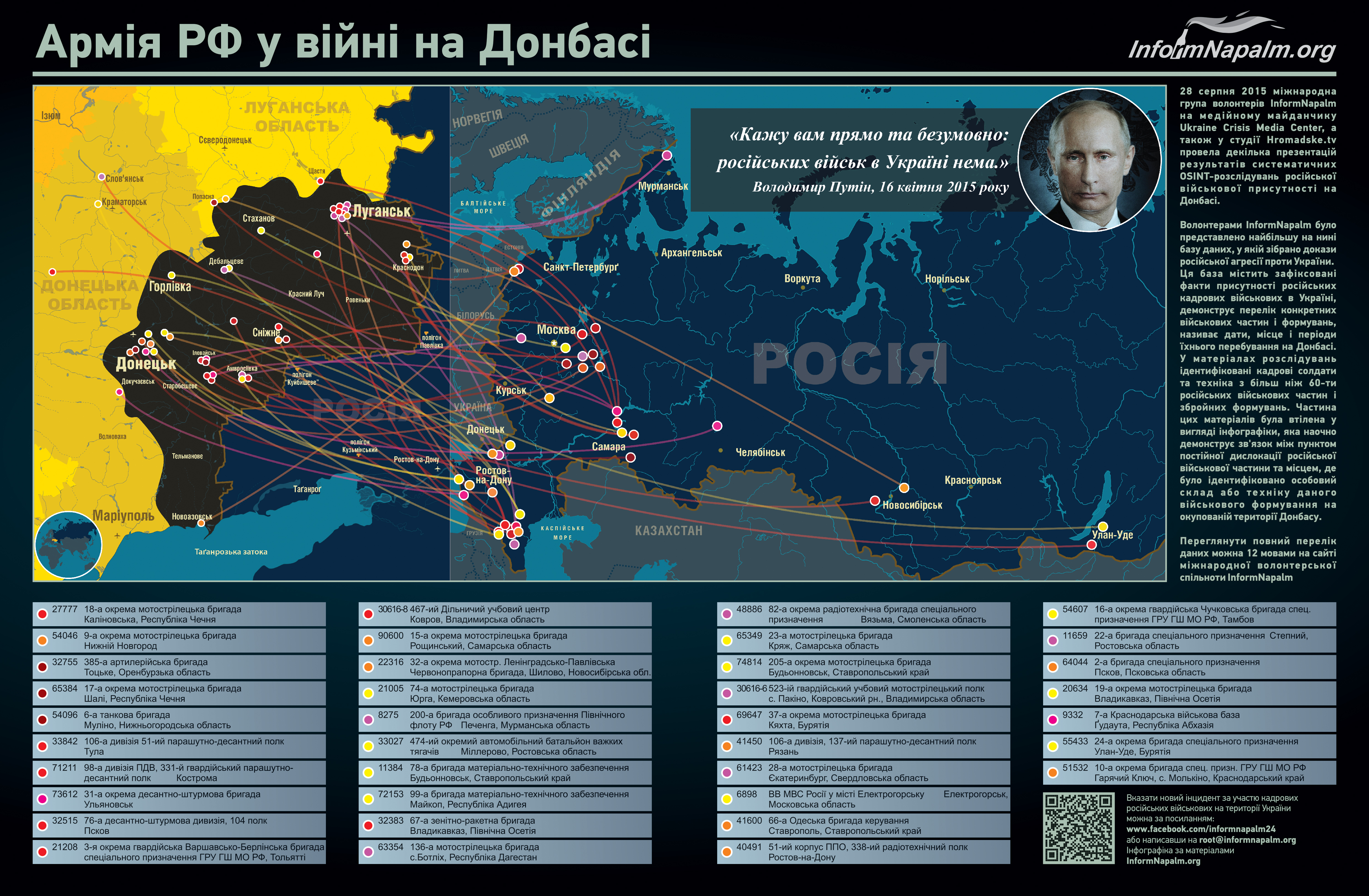 Інфографіка від Inform Napalm. Армія РФ у війні на Донбасі